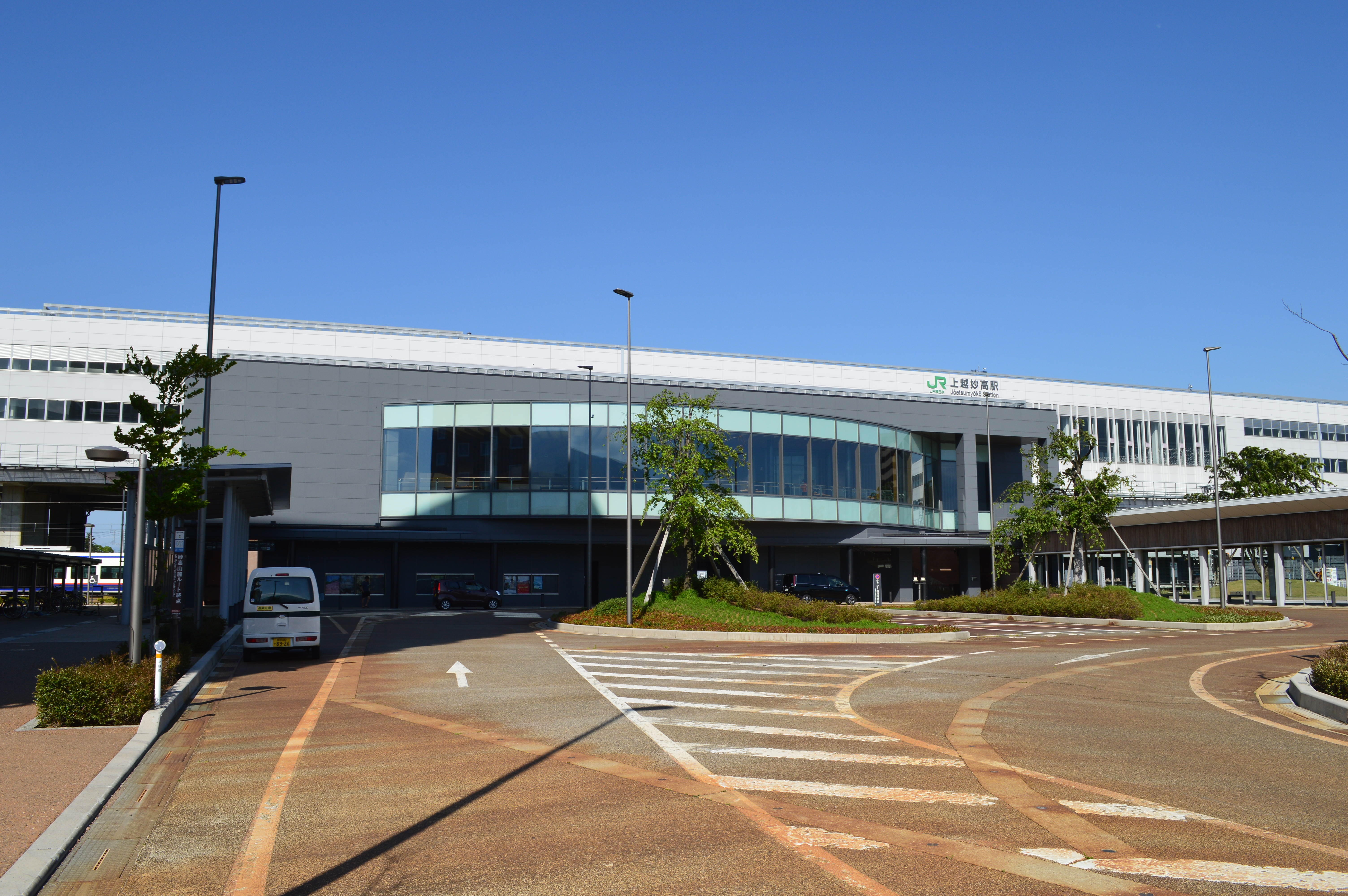 上越妙高駅 駅舎